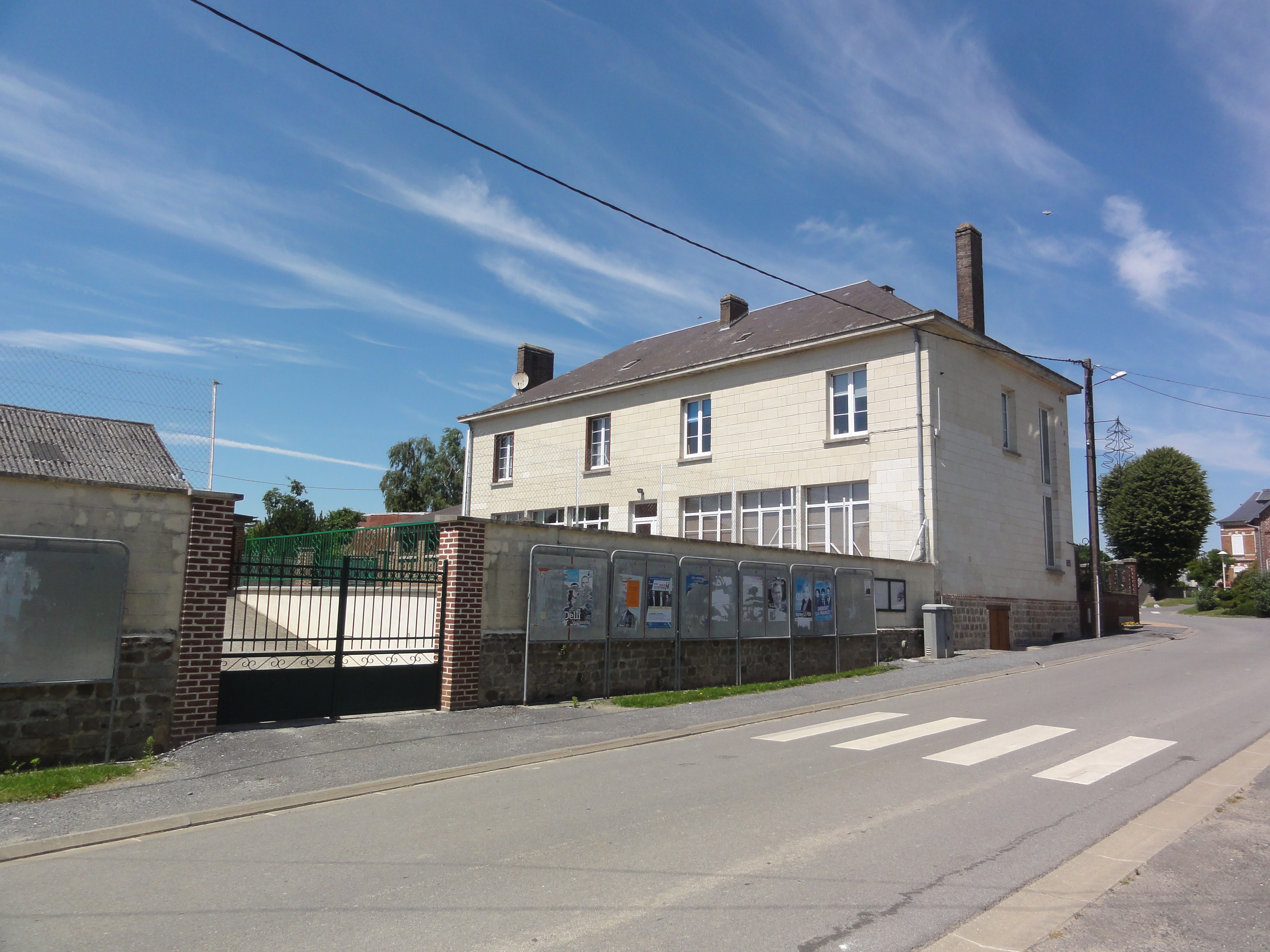 Housset (Aisne) mairie-école